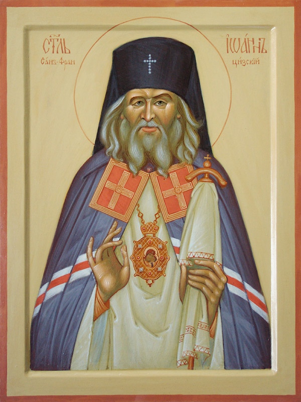 ИМ "Елеон": .ua Икона: #art #eikon #orthodox #temp #saints #ikona #izograf #iconographer #freska #икона #православие #искусство #церковь #церковное #храм #фреска #стенопись